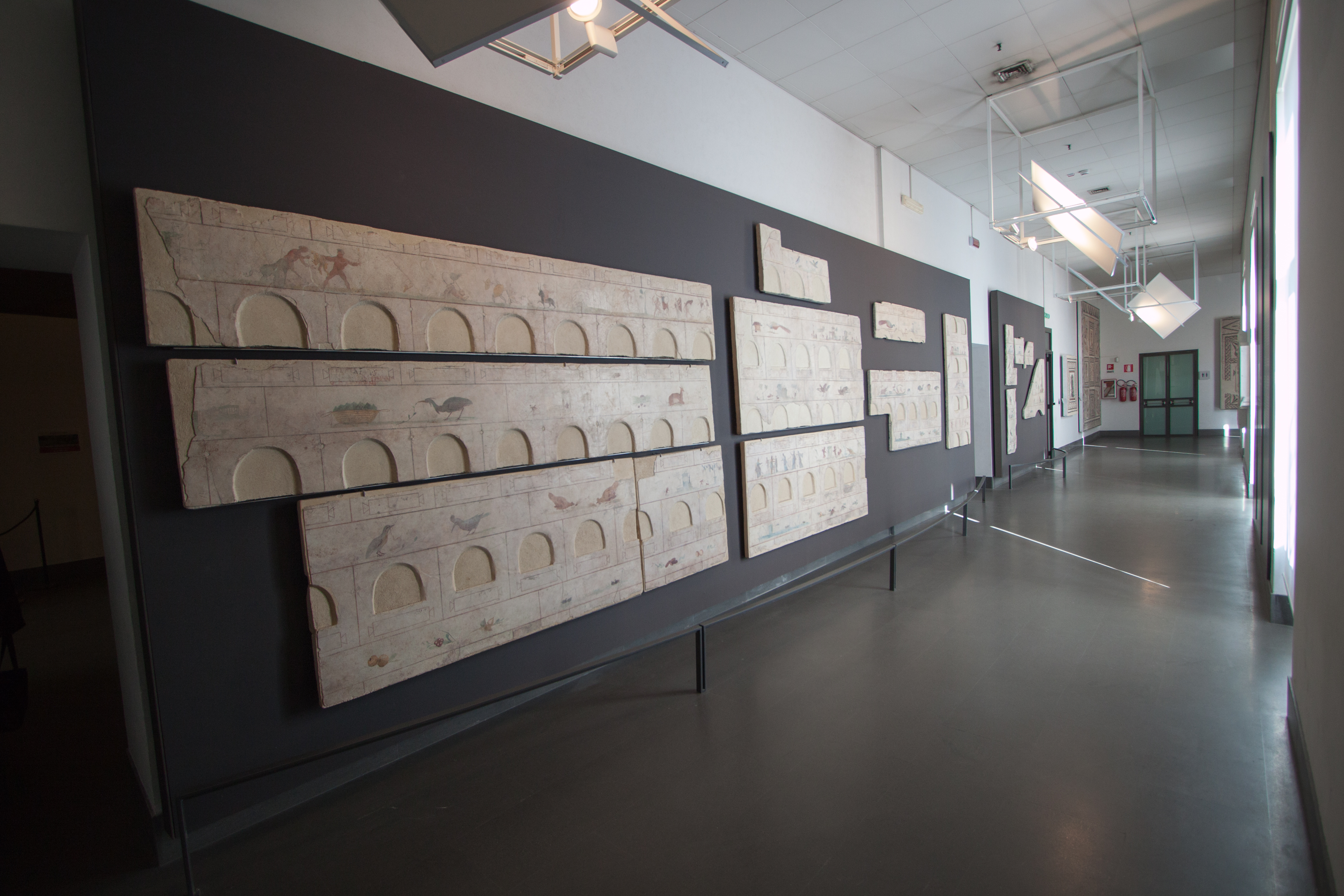 Palazzo Massimo interior